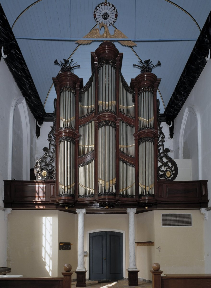 Nederlands Hervormde Kerk: Interieur, aanzicht orgel, orgelnummer 139 (opmerking: Gefotografeerd voor Het Historische Orgel in Nederland 1858-1865)